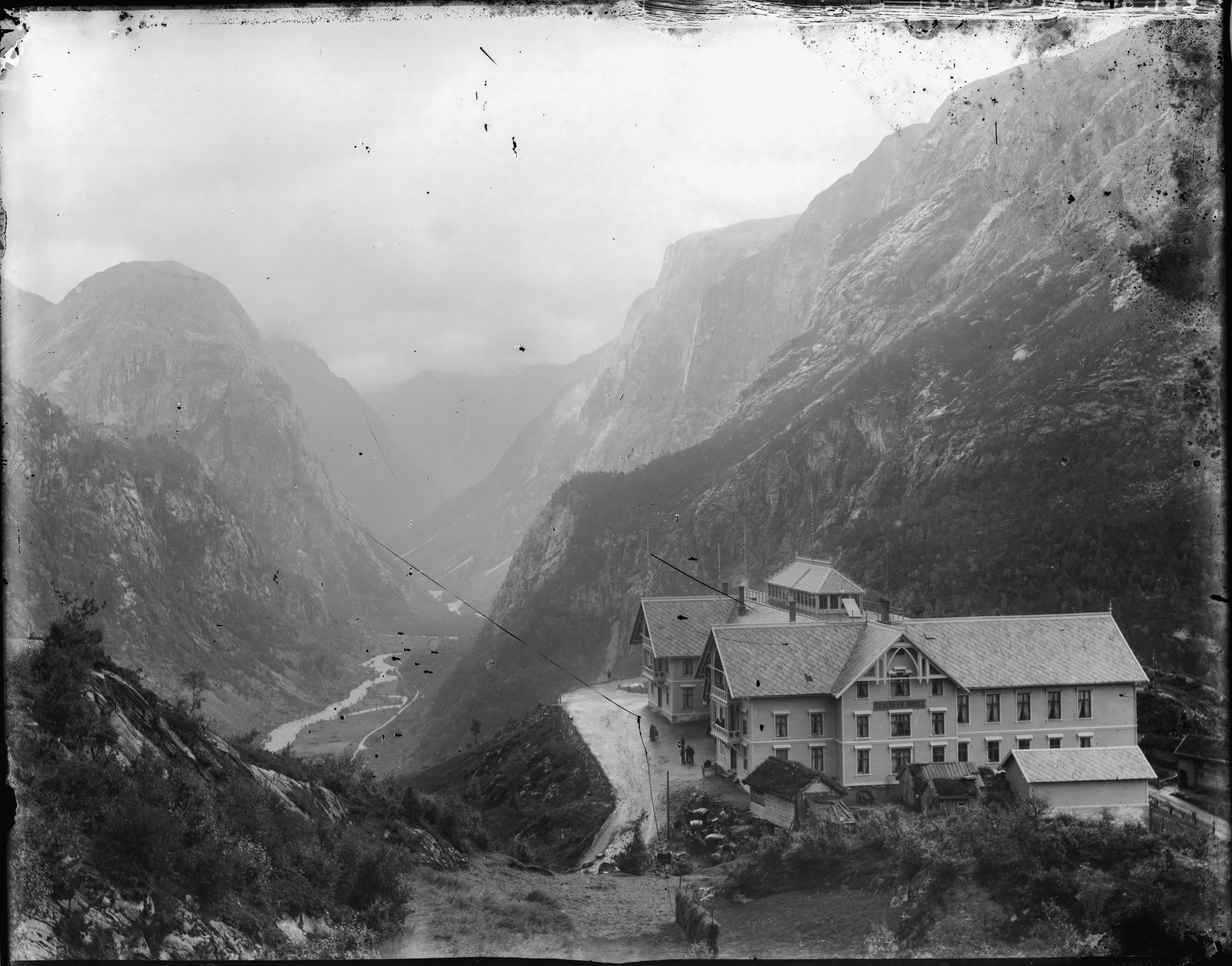 Påskrift negativ: 281 Stalheim Hotel Skøien [Riksantikvaren] Påskrift konvolutt: B-281 Vossestrand Hotel Stalheim II [Riksantikvaren] Sted: Nærøydalen,Stalheim Kommune: Voss Fylke: Hordaland Tagger: landskap fjell dalføre utsikt fasade hotell Stalheim hotel